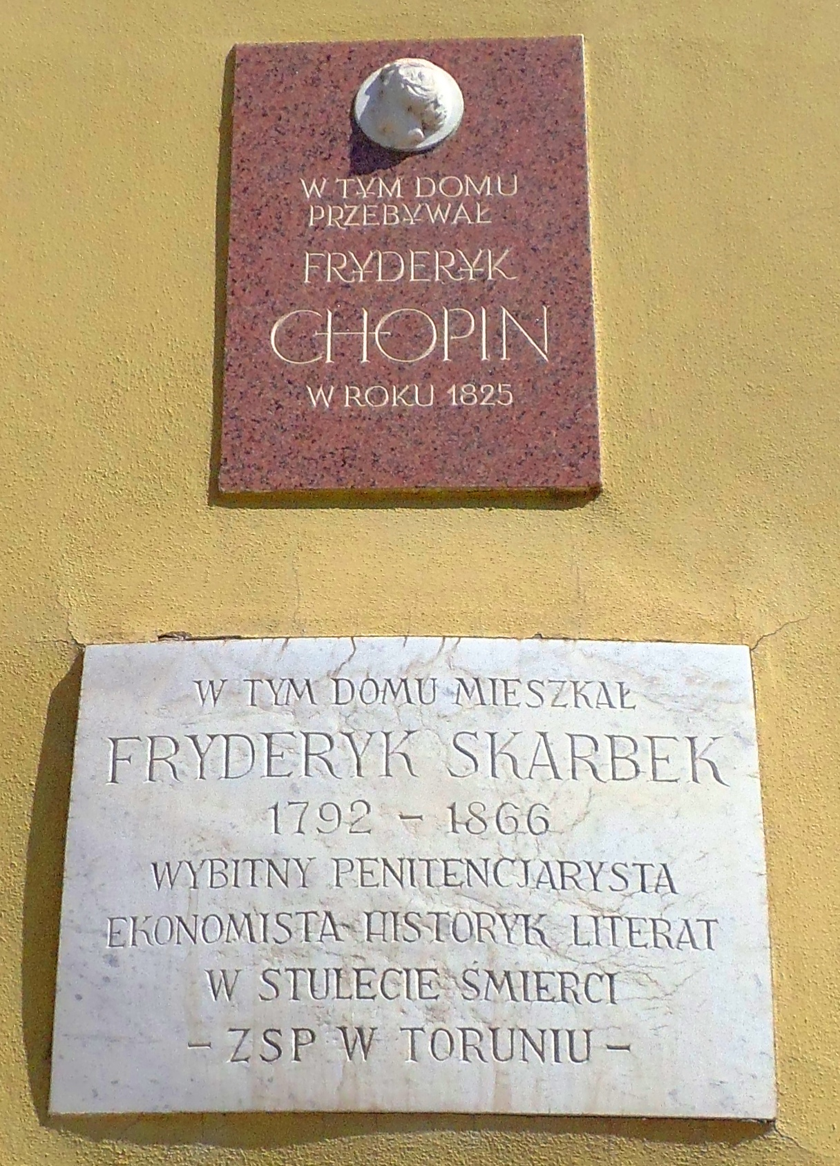 Tablice na Pałacu Fengerów w Toruniu, upamiętniające Fryderyka Skarbka i Fryderyka Chopina